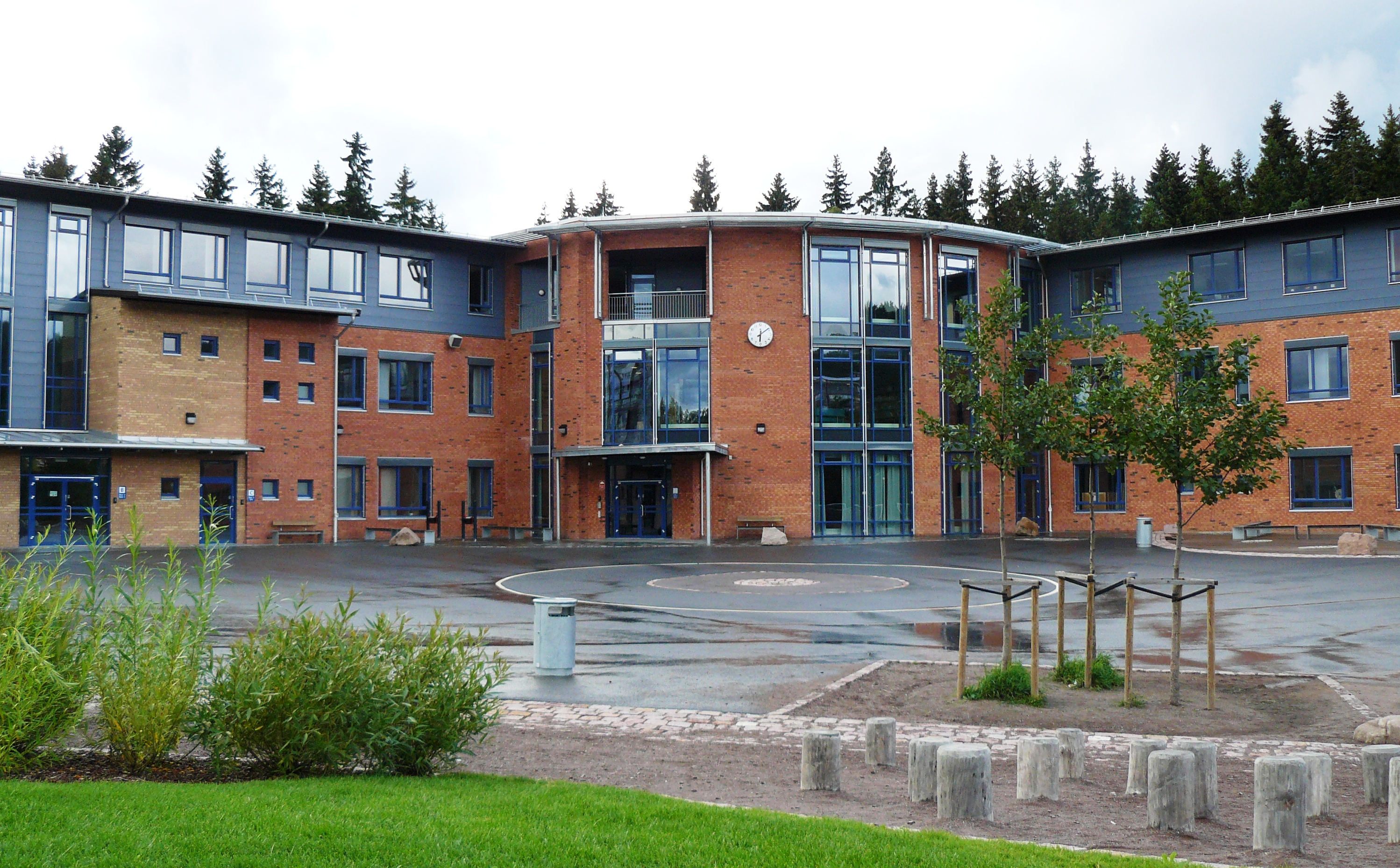 Ammerud school,Oslo